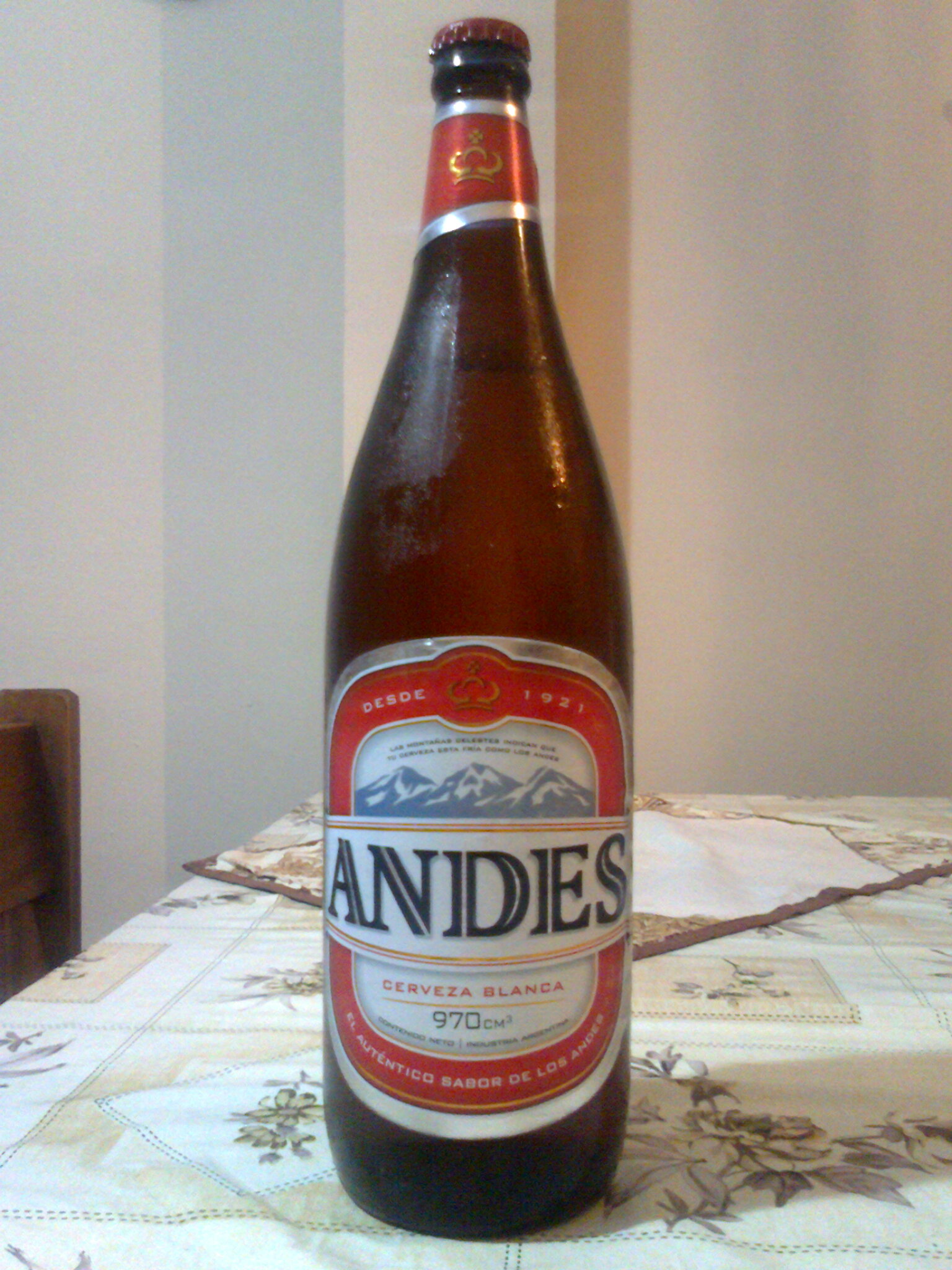 Envase de una Cerveza Andes «Blanca» de 970 cm3.